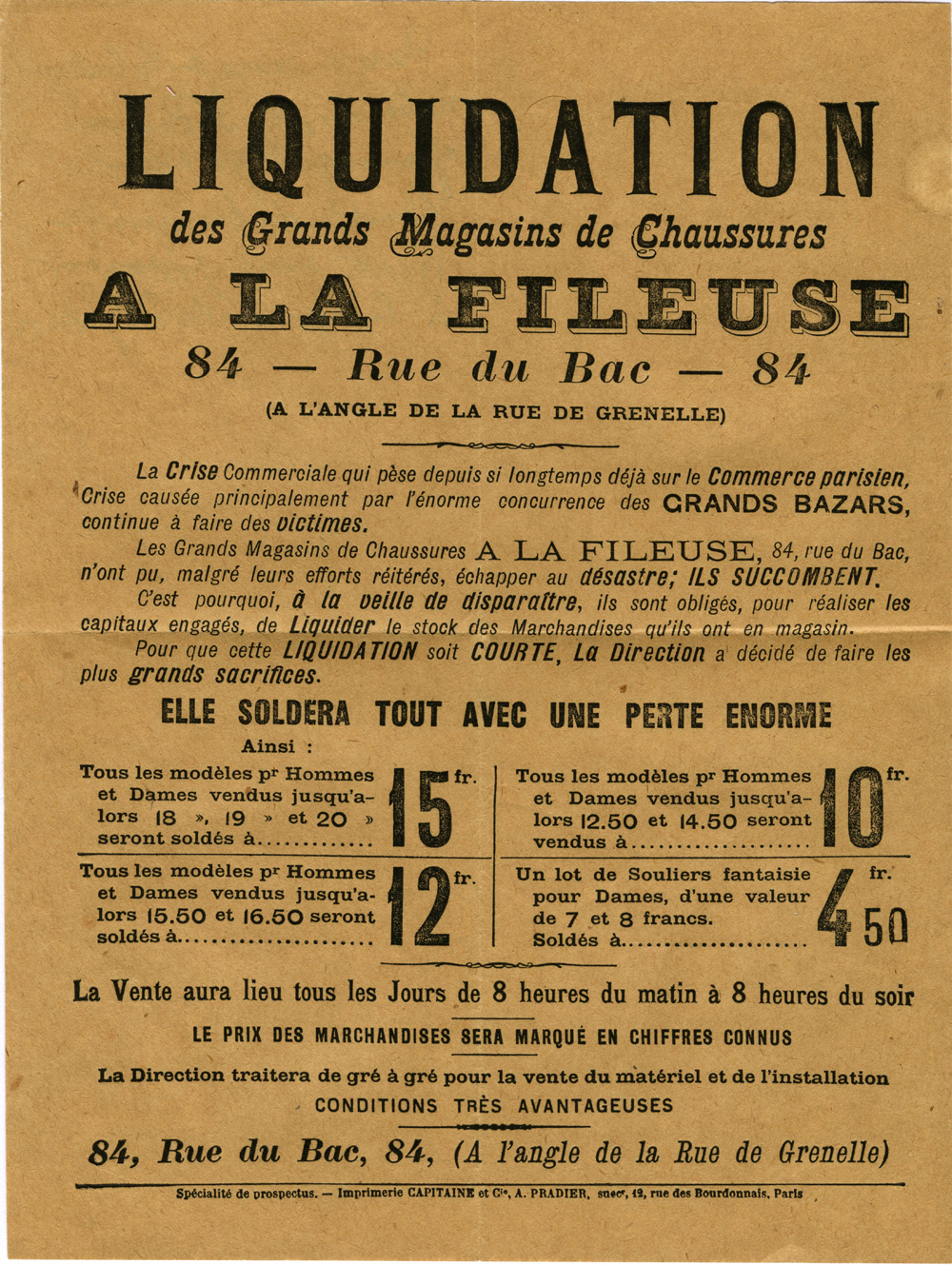 prospectus d'un commerçant parisien victime de la concurrence nouvelle des grands basars